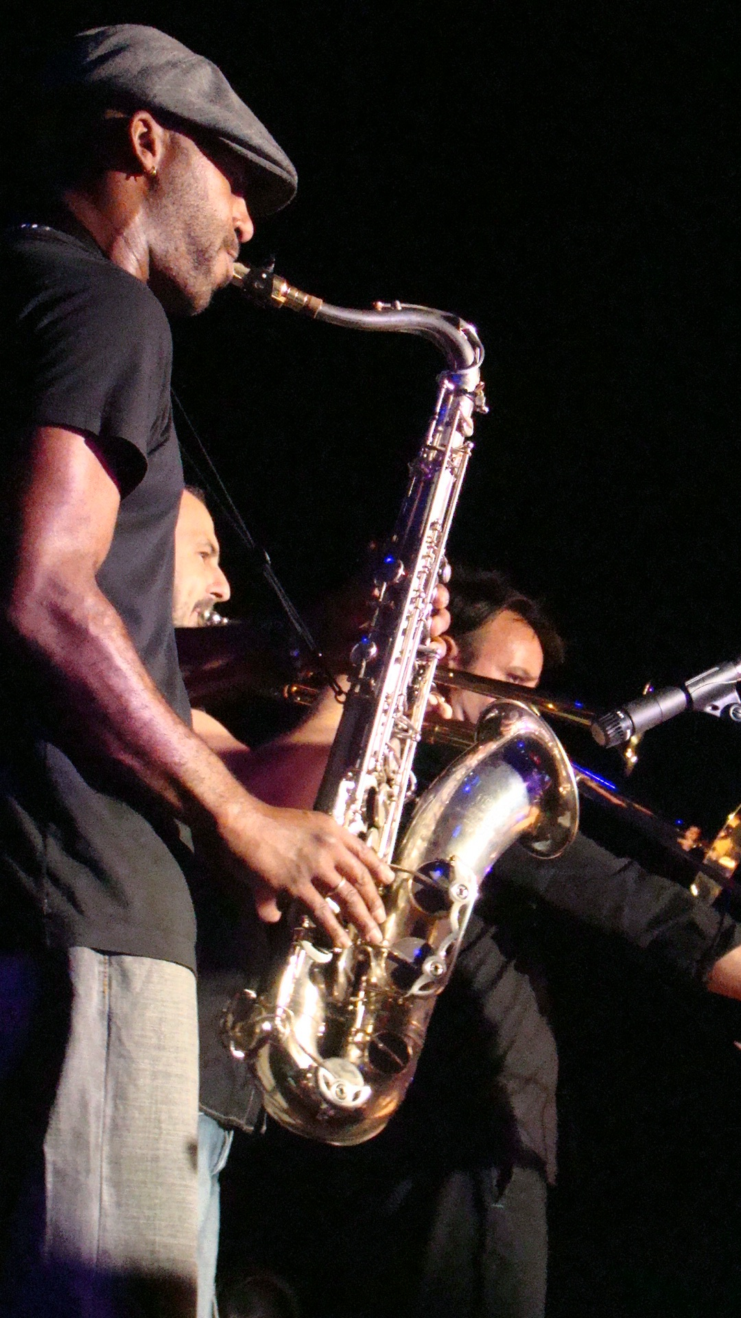 Nardy Castelliny - 2008